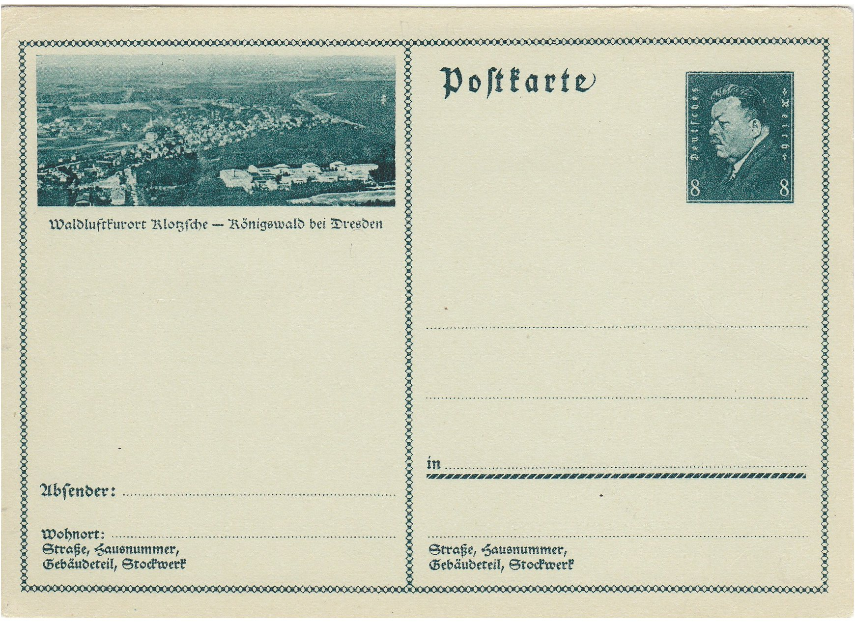 Bildpostkarte: Michel Nr. P 192 / 012 Klotzsche-Königswald, Fernblick mit Reichspräsident Friedrich Ebert 8 Pfennig Wertstempel